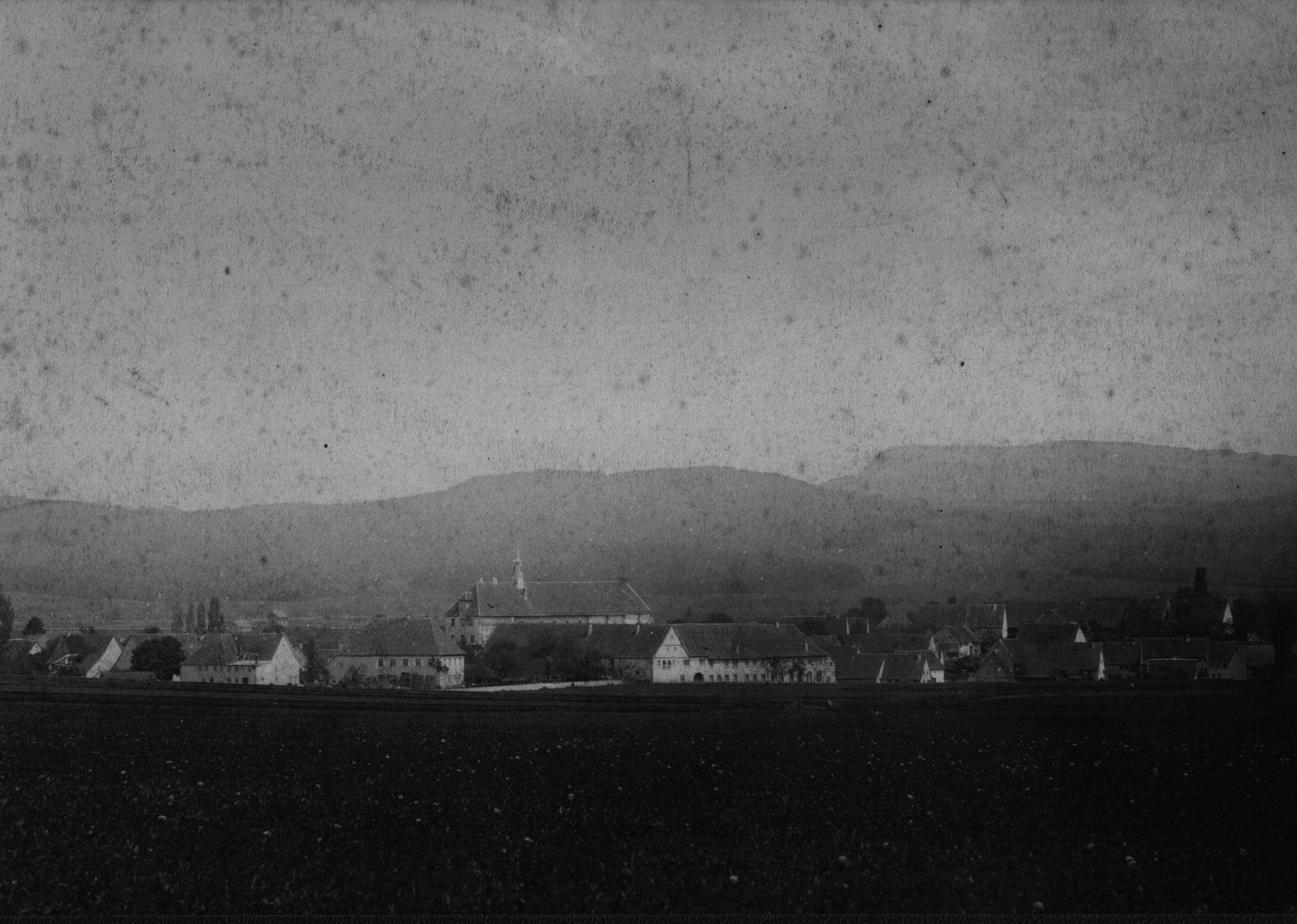 Kloster Stetten vor 1898